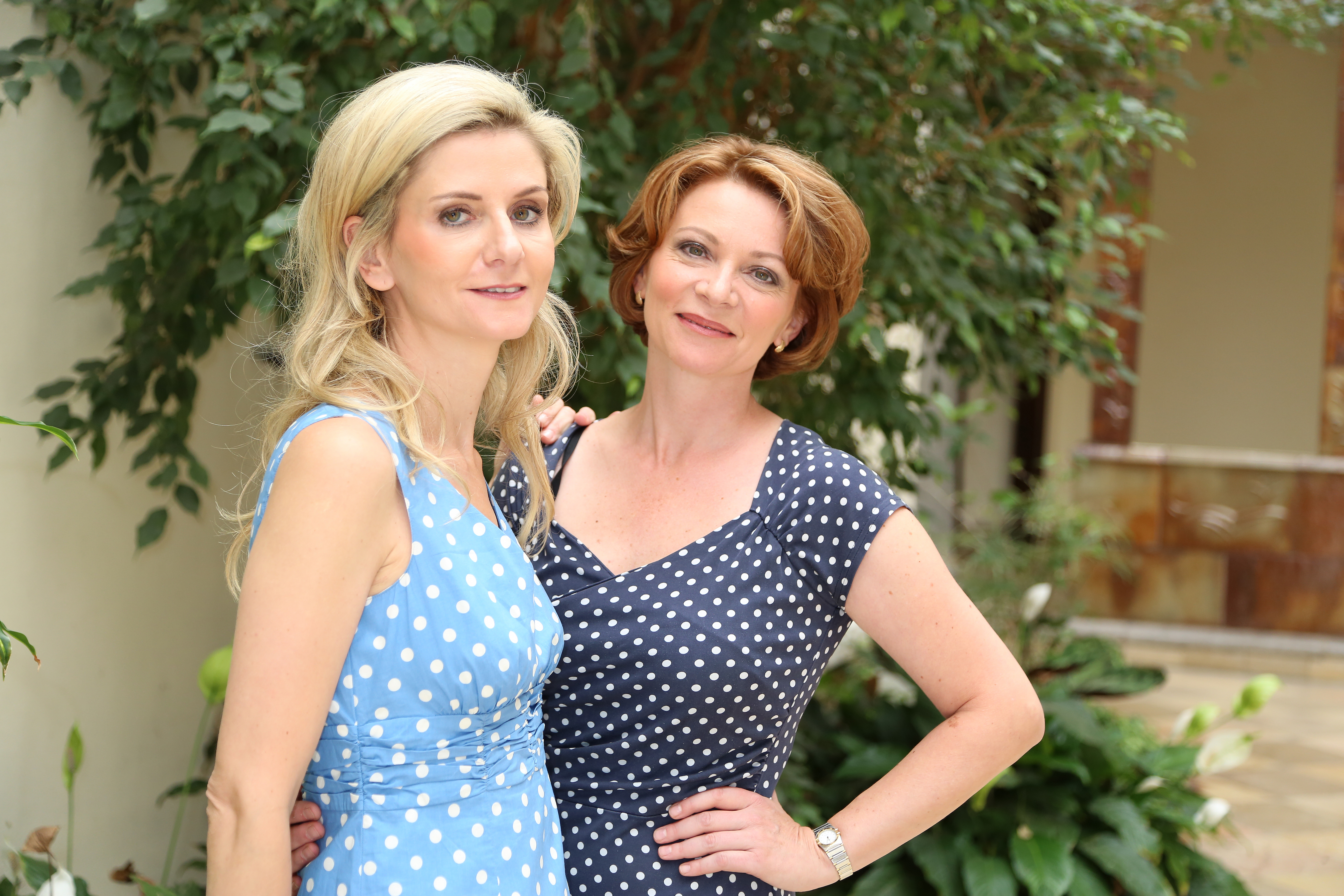 Klavierduo Anna und Ines Walachowski Ines Walachowski